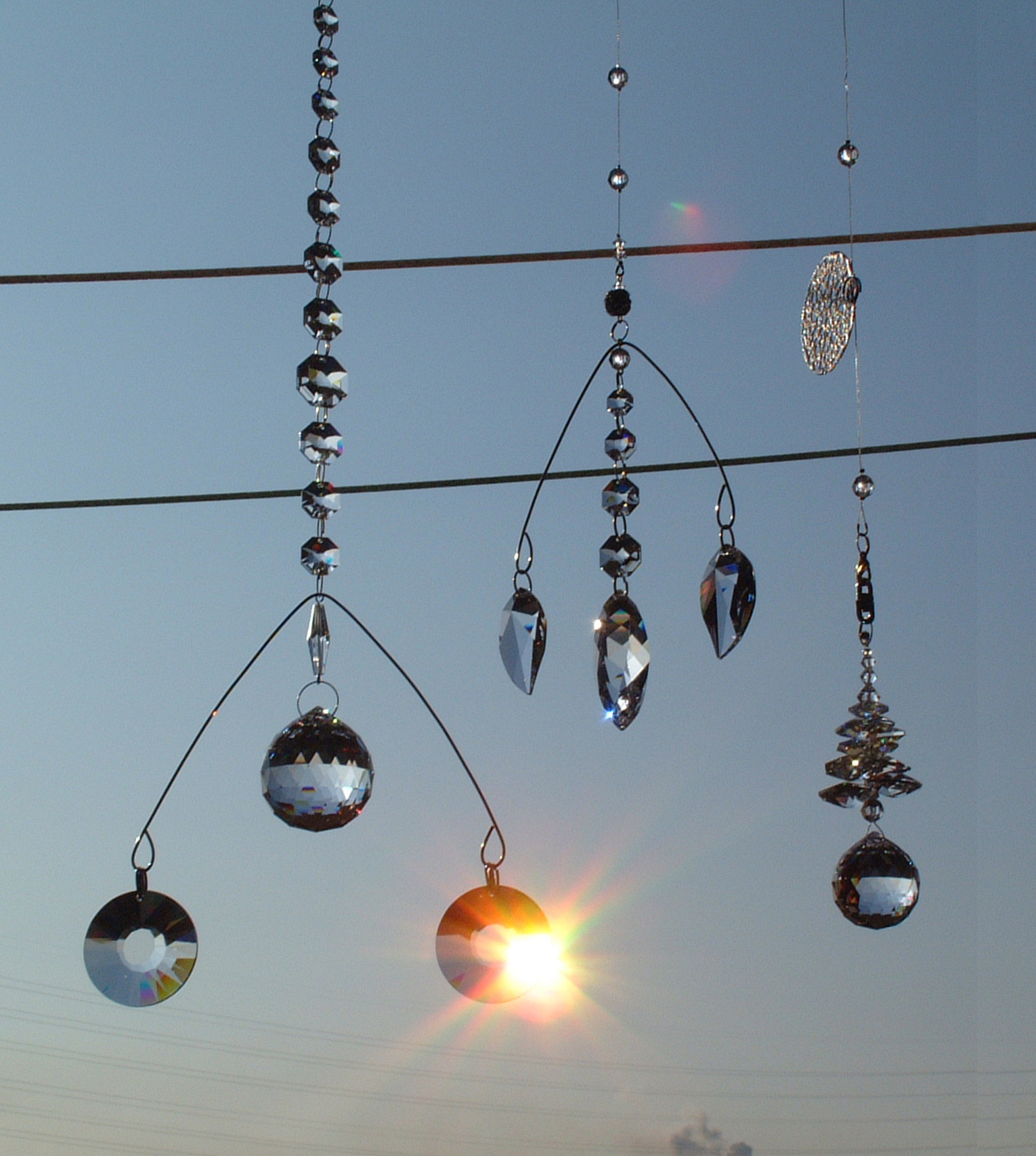 風モビール型のサンキャッチャー3種サンキャッチャー